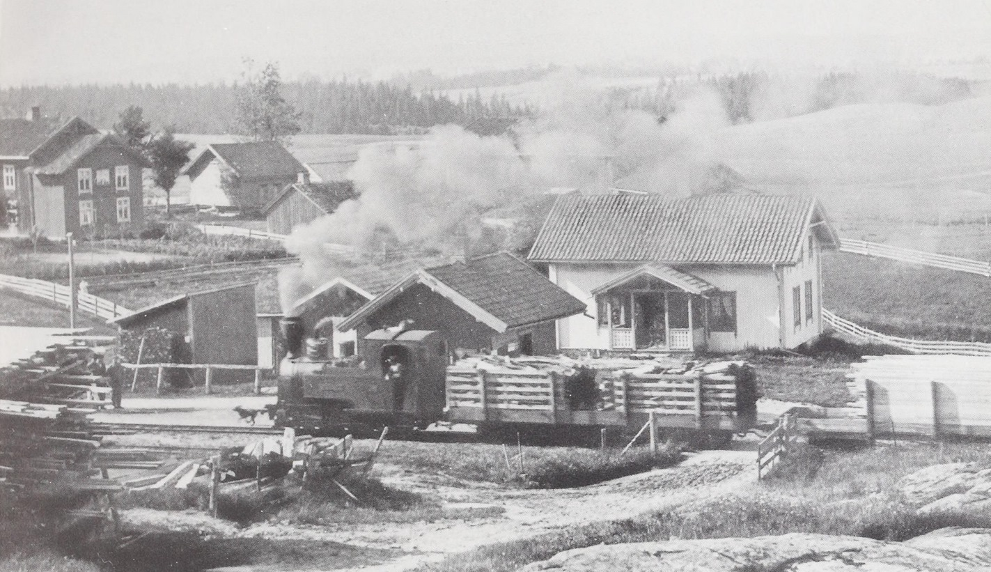 Kvevli stasjon på Urskog-Hølandsbanen. Foto: Karl Norum, ca. 1910. Gjengitt i boken «Banen og bygda: Tertitten gjennom hundre år».